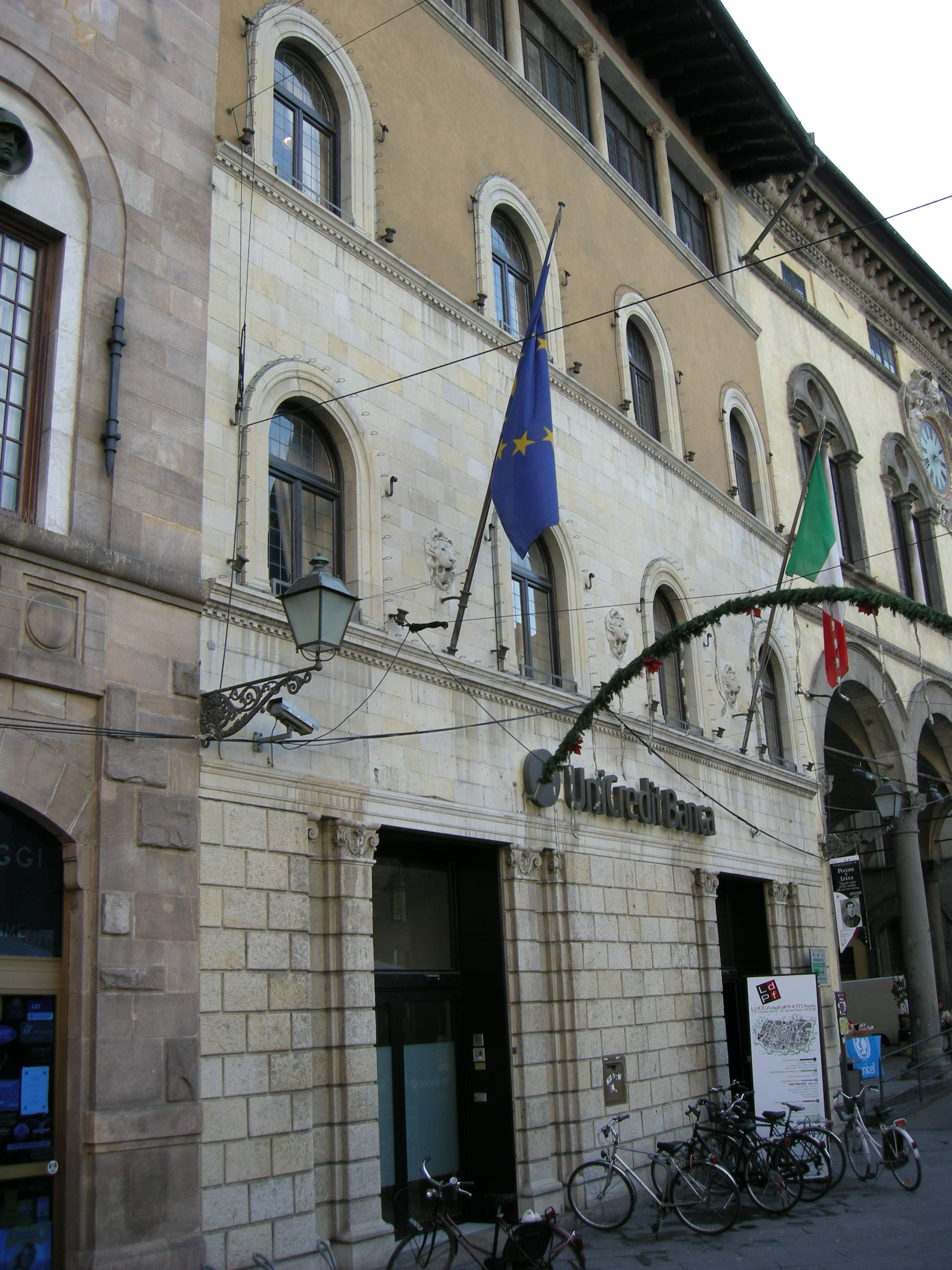 Palazzo unicredit, lucca